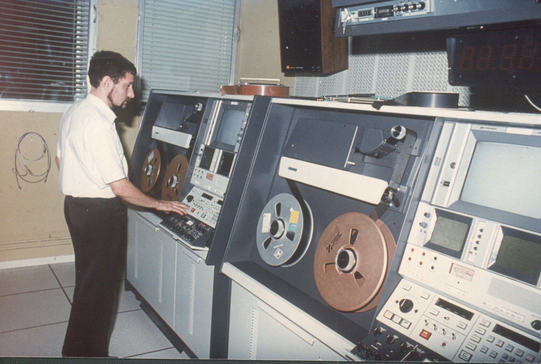 Magnétoscope professionnel quadruplex (années 1975)AMPEX AVR3 Photo perso J. THURION Belgavox